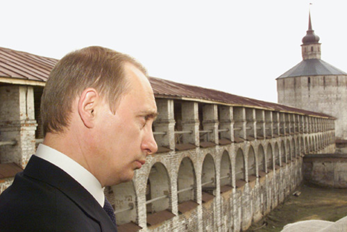 КИРИЛЛОВ, КИРИЛЛО-БЕЛОЗЕРСКИЙ МУЗЕЙ-ЗАПОВЕДНИК. Во время осмотра Кирилло-Белозерского монастыря.